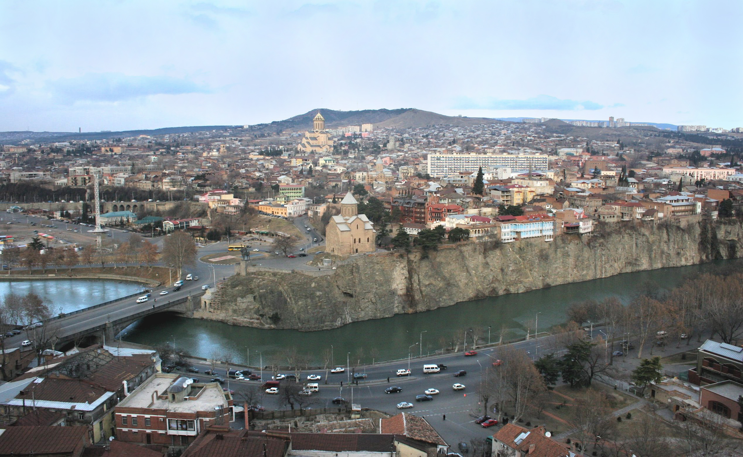 Metekhi at dusk, Tbilisi